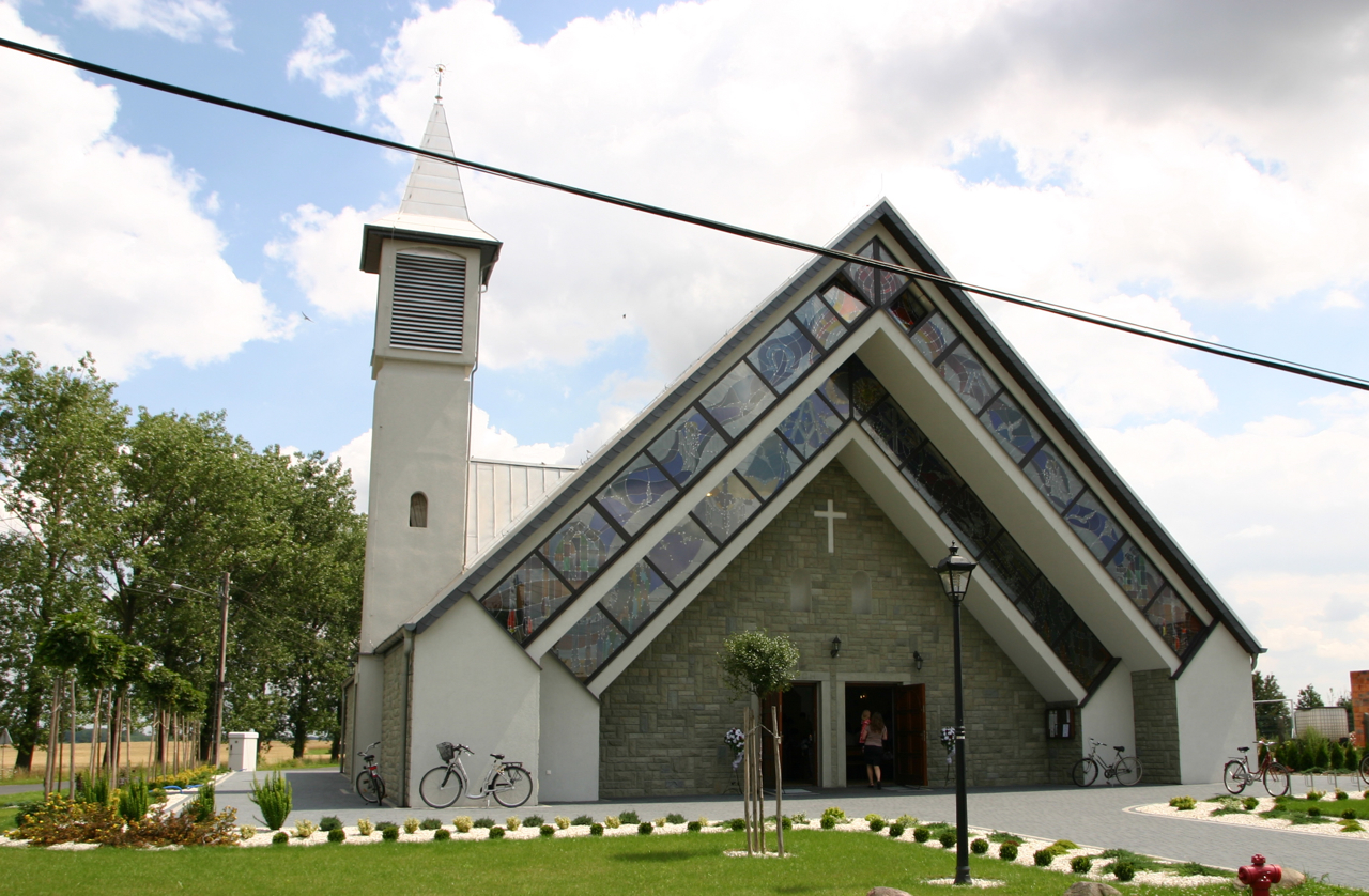 Pogórze (dodatkowa nazwa w j. niem. Pogosch) – wieś w Polsce położona w województwie opolskim, w powiecie prudnickim, w gminie Biała.